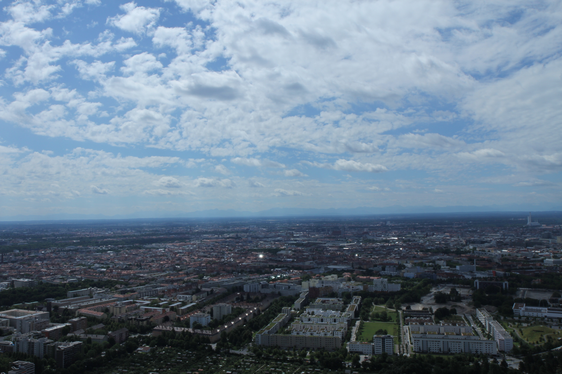 Wikipedia im Landtag – Bayern 17. bis 19. Juli 2012 in München Dieses Foto wurde im Rahmen des Projektes „Wikipedia im Landtag“ erstellt.